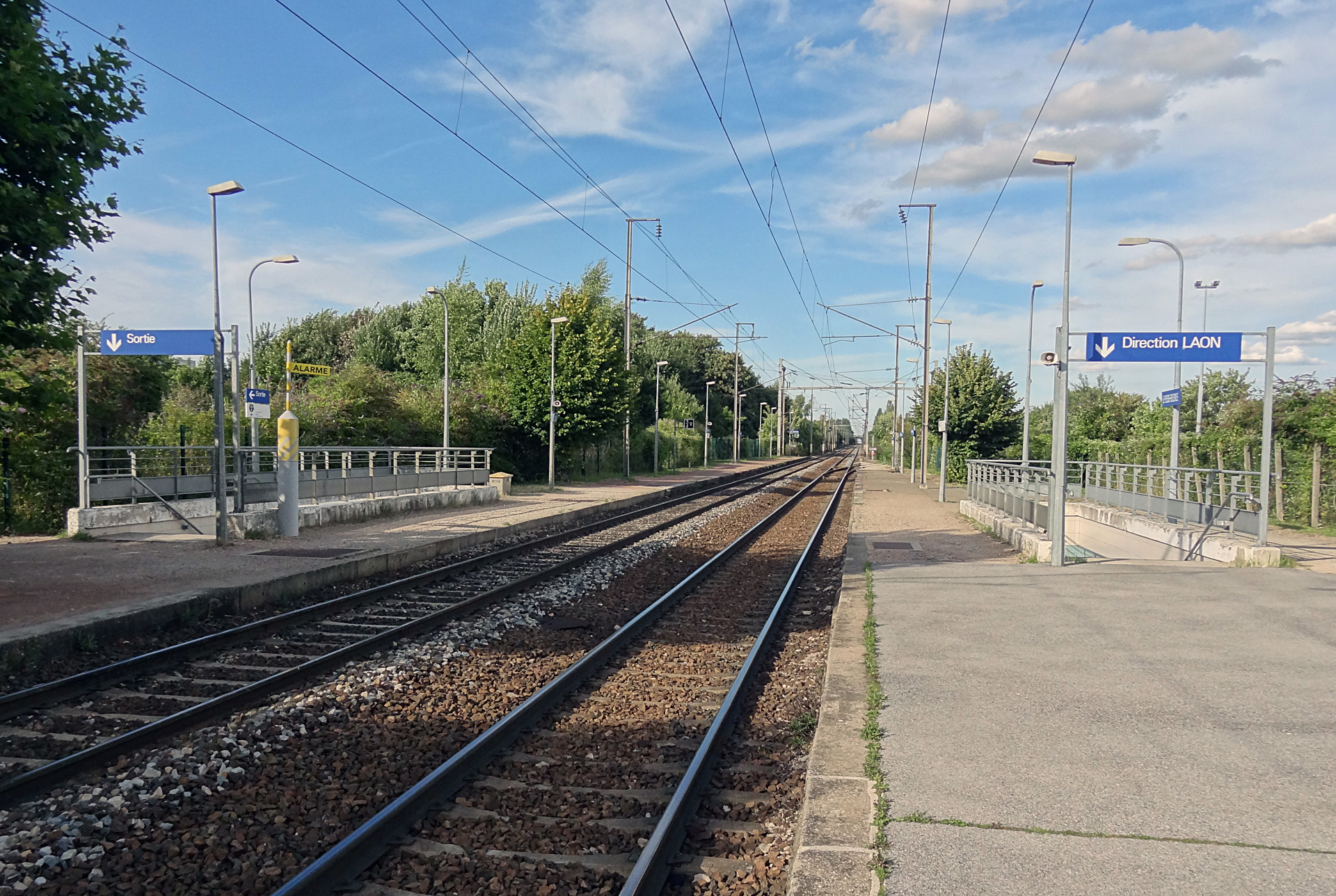 La gare du Plessis-Belleville (Oise), France.